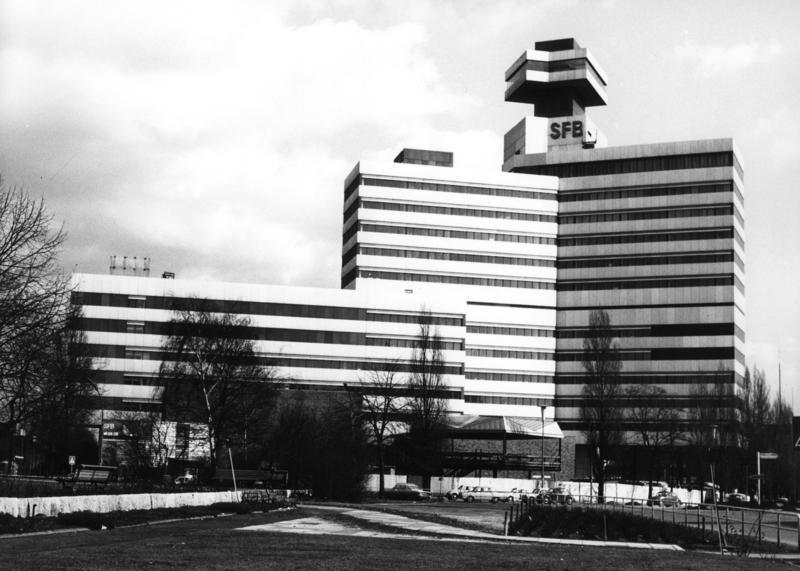 Berlin-West Das neue Fernseh-Zentrum des SFB am Theodor-Heuss-Platz.